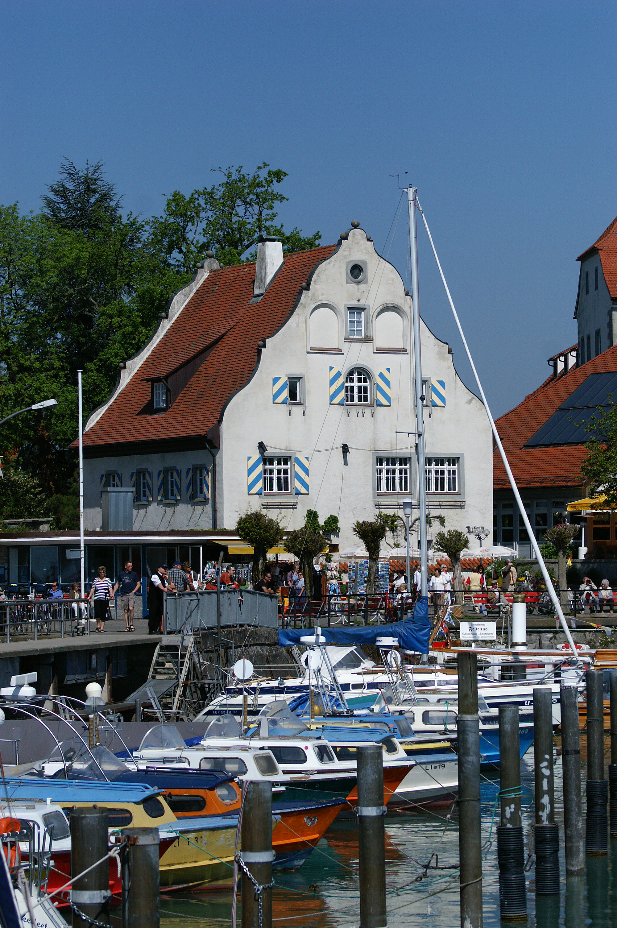 der Hafen und das Malhaus, erbaut 1597 in Wasserburg am Bodensee).